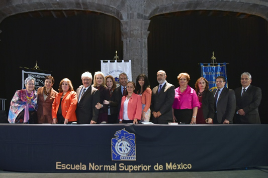 Evento para reconocer la trayectoria de la Escuela Normal Superior de México